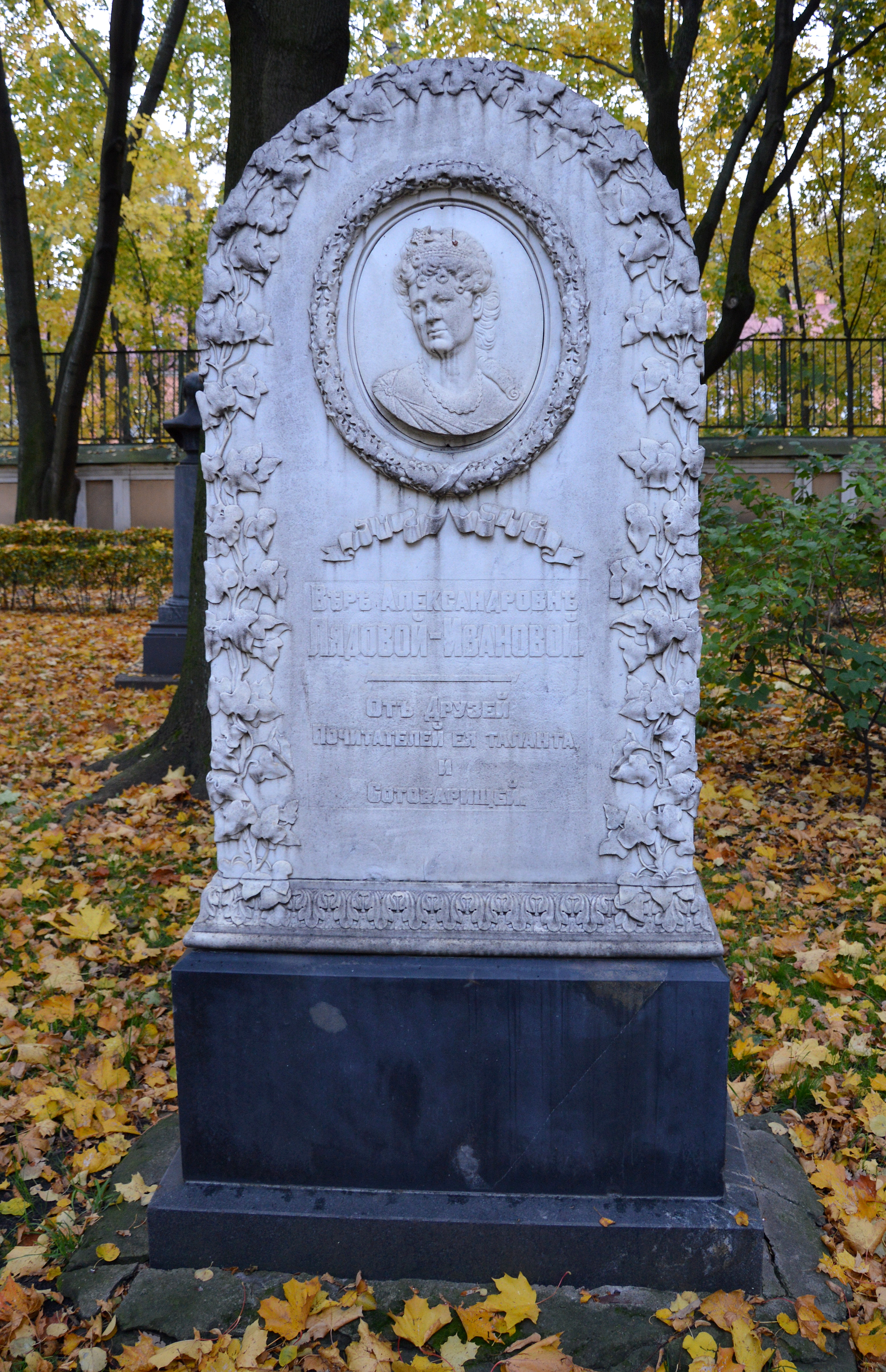 Liadov, Vera Alexandrowna, russische Sängerin, Grabmal in Sankt Petersburg